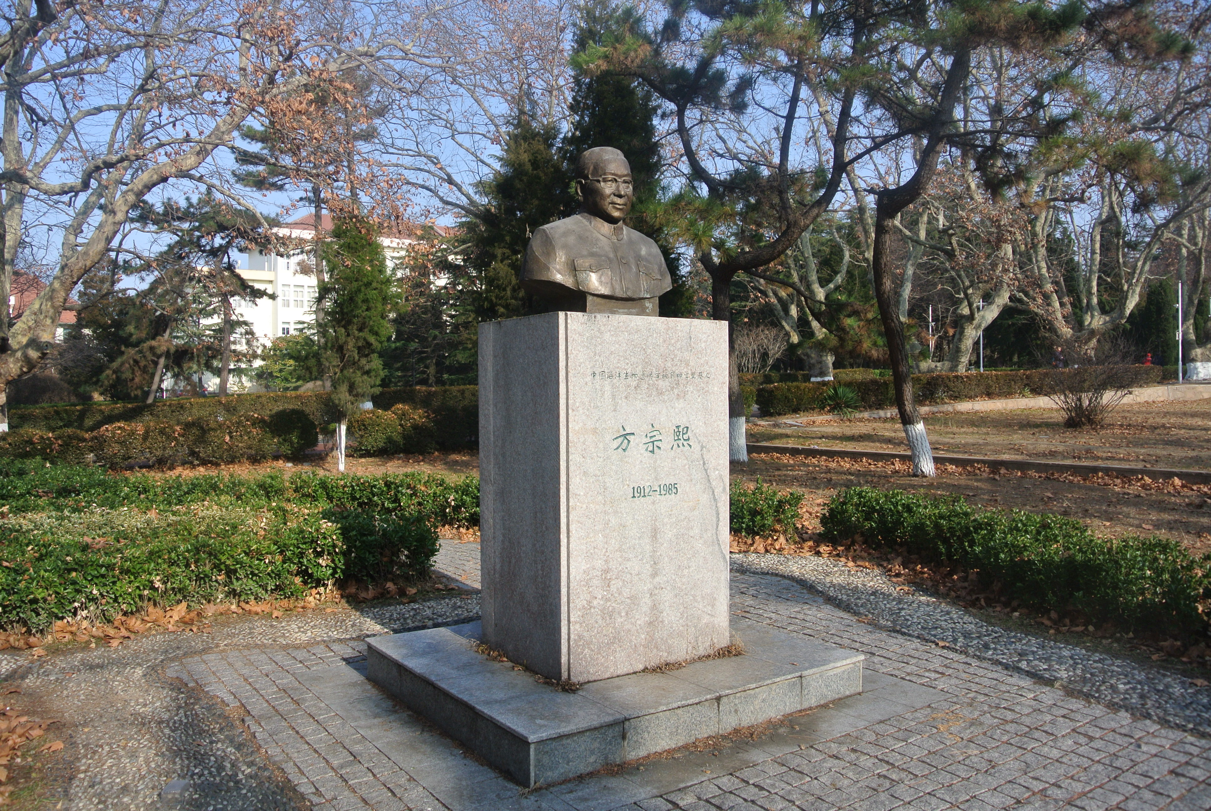 中国海洋大学鱼山校区方宗熙雕像